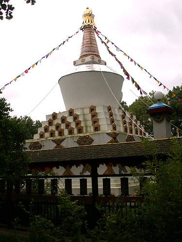 Eigen werk. Stupa boeddhistisch klooster bij Hantum.